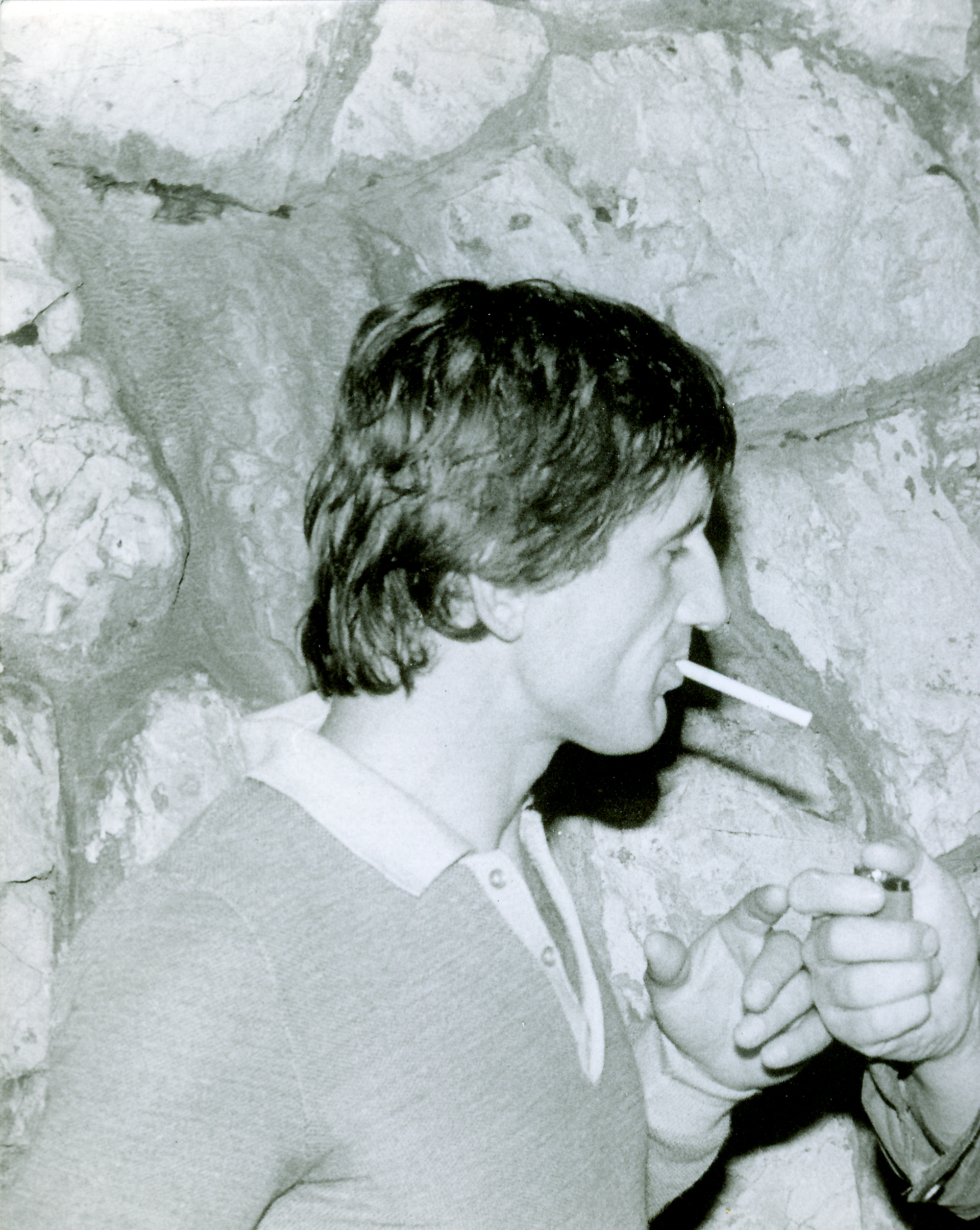 Ratko Tankosić - Sarma na Filmskim susretima u Nišu 1984. godine